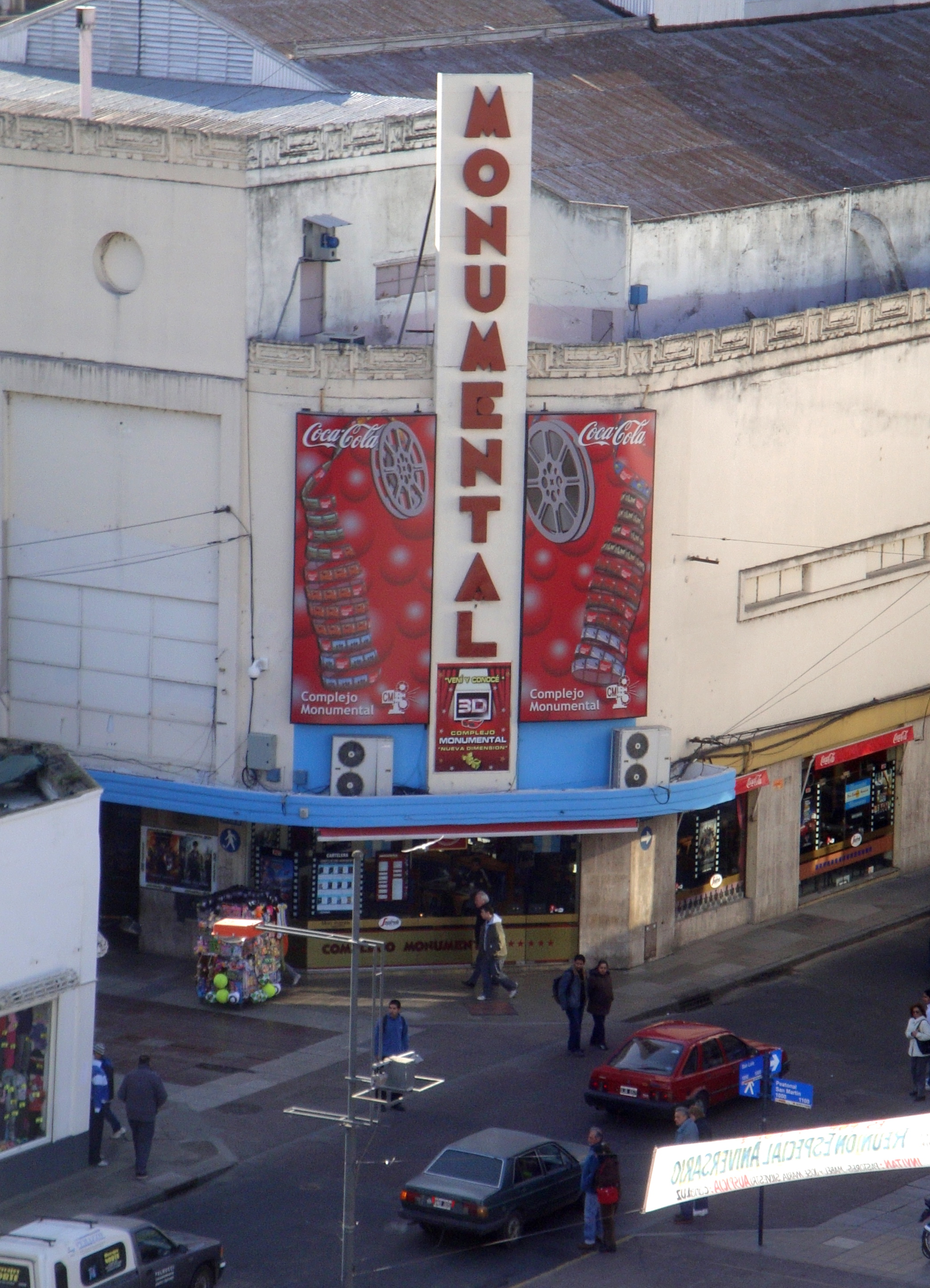 Vista del Cine Monumental, Rosario, Argentina.